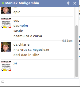 facebook chat